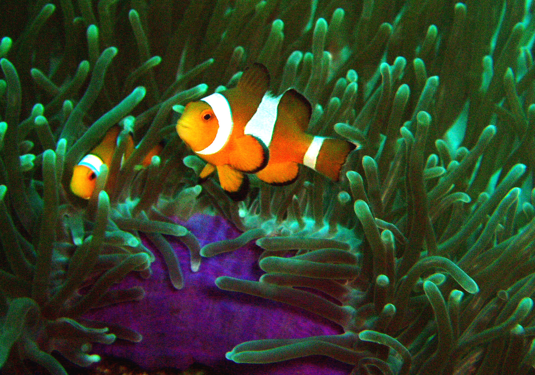 Anemonenfisch, auch westlicher oder falscher Clownfisch (Amphiprion ocellaris) genannt, vor einer Prachtanemone (Heteractis magnifica), mit der er in Symbiose lebt.